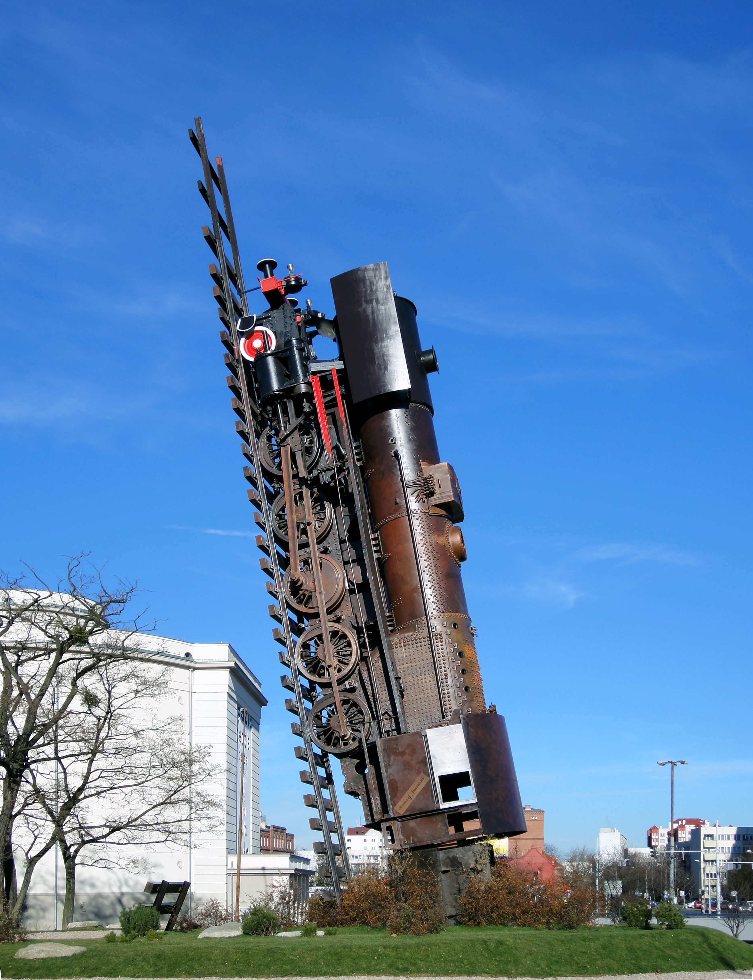 Wrocław - rzeźba miejska "Pociąg do Nieba", plac Strzegomski